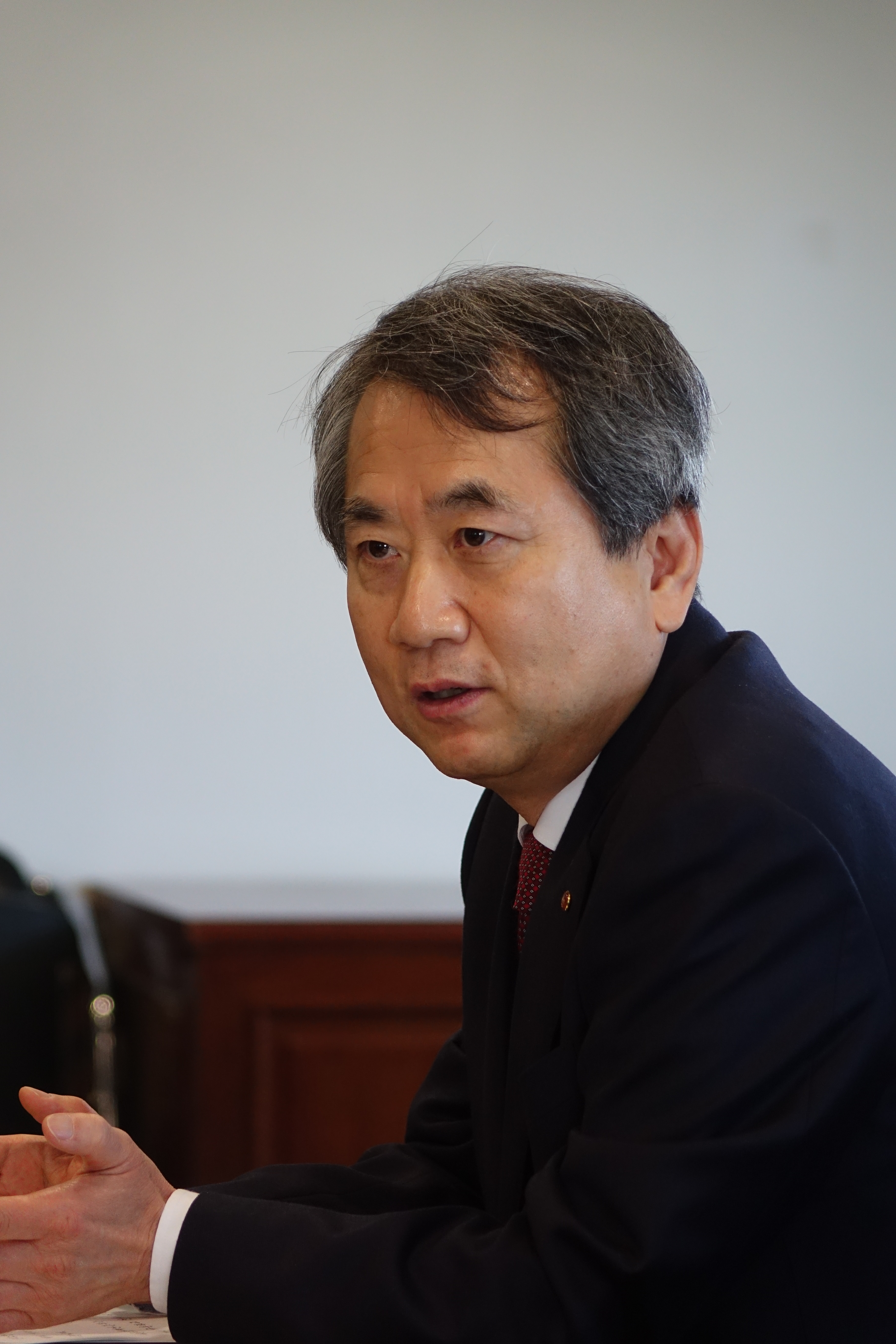 신구, 2015년 세종대학교 서울소방재난본부 업무제휴 협약 체결식